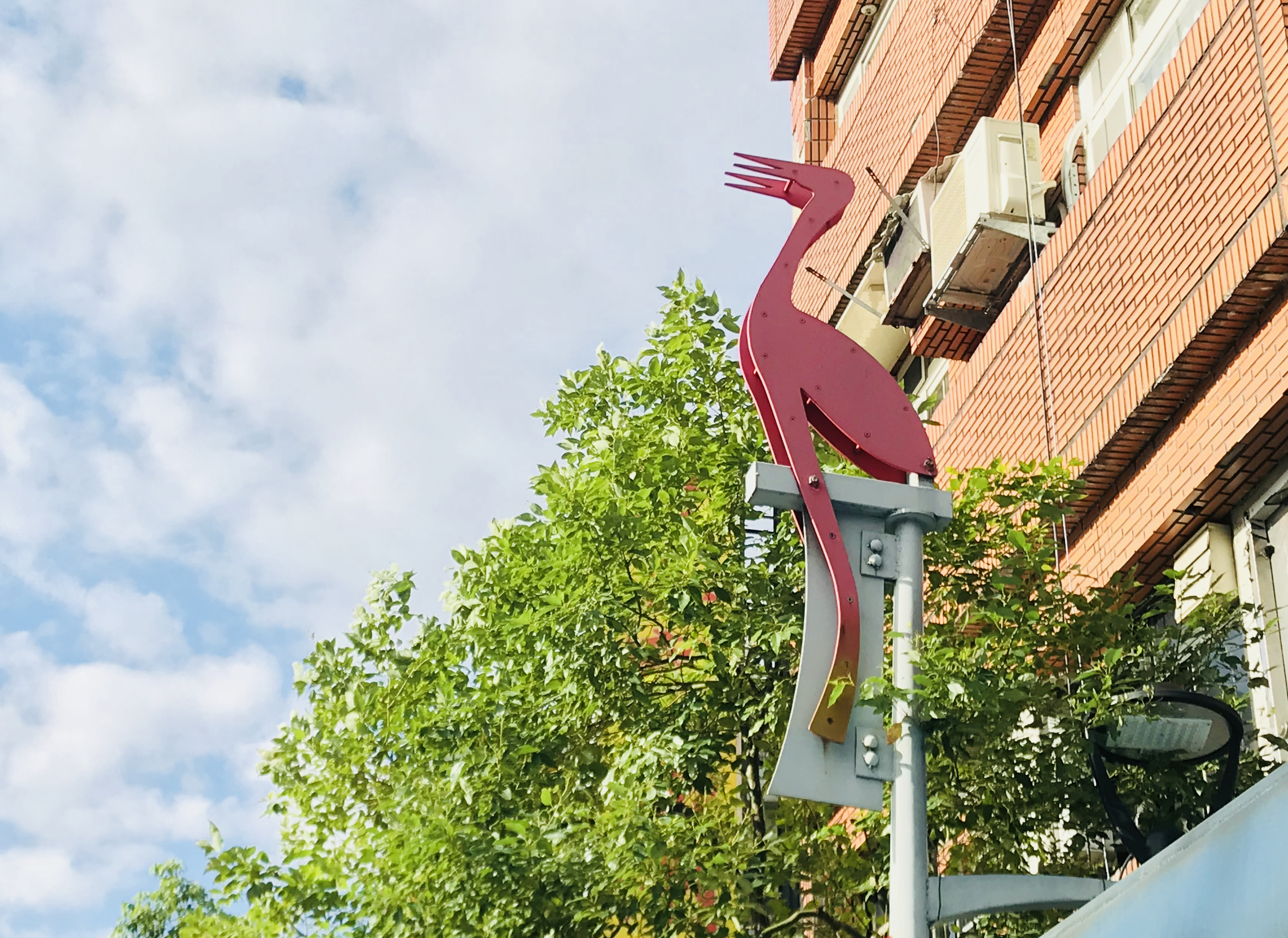 台北鳥店街路燈上的鳥類圖案